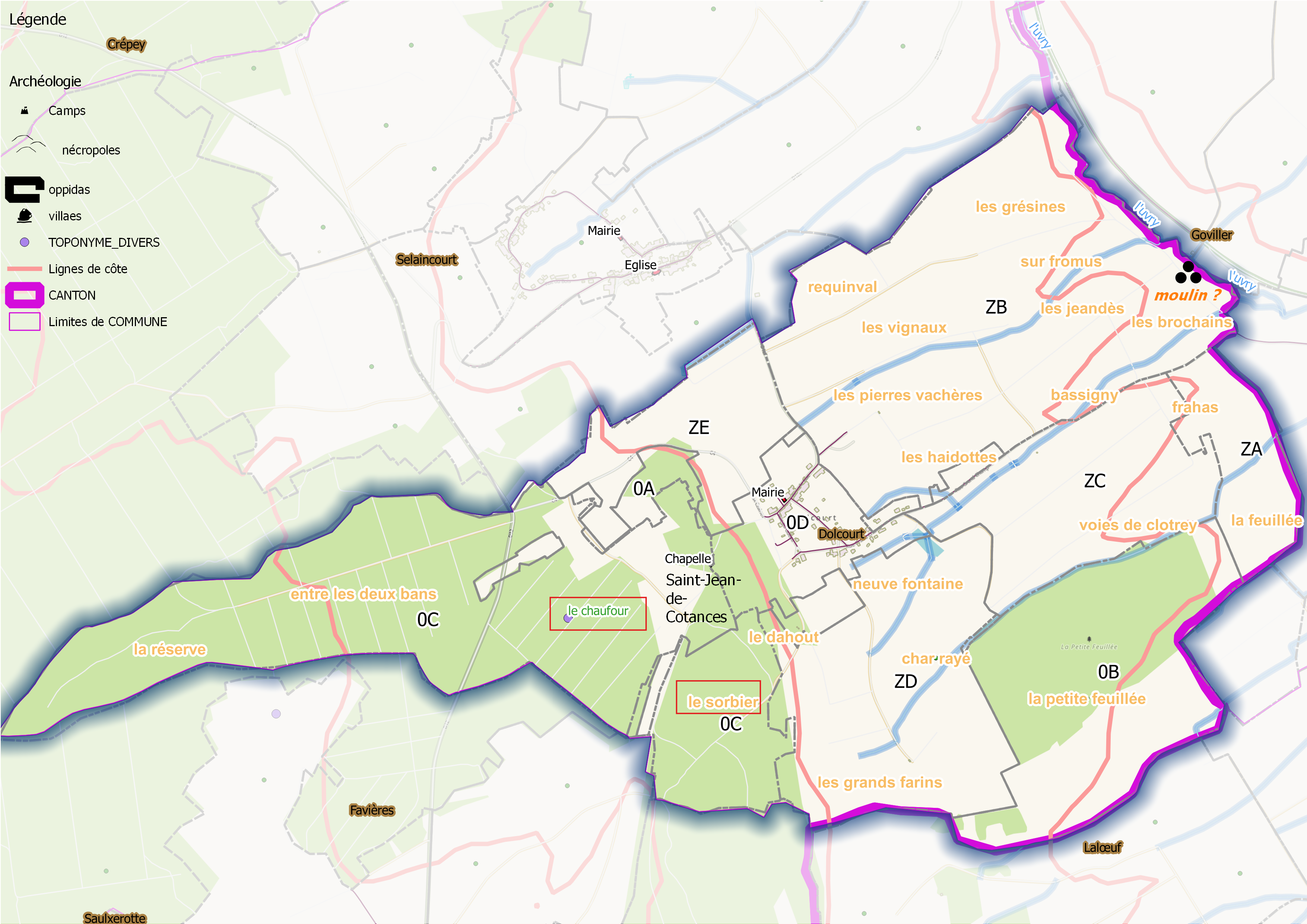 Dolcourt (ban communal) OSM et Qgis, mentions manuscrites